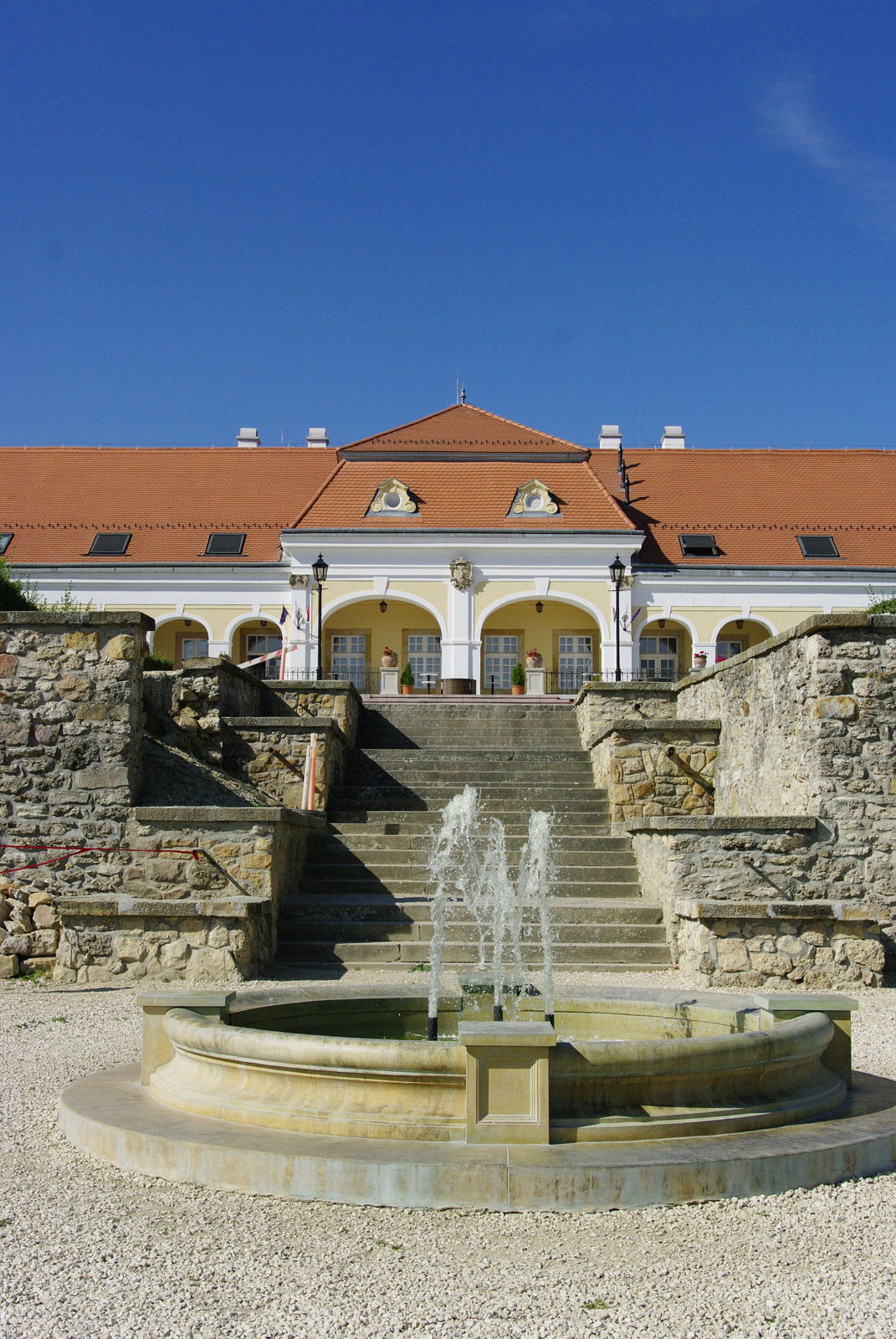 Teleki-kastély (Pomáz, Templom tér 3.) This is a photo of a monument in Hungary, Identifier: 7250